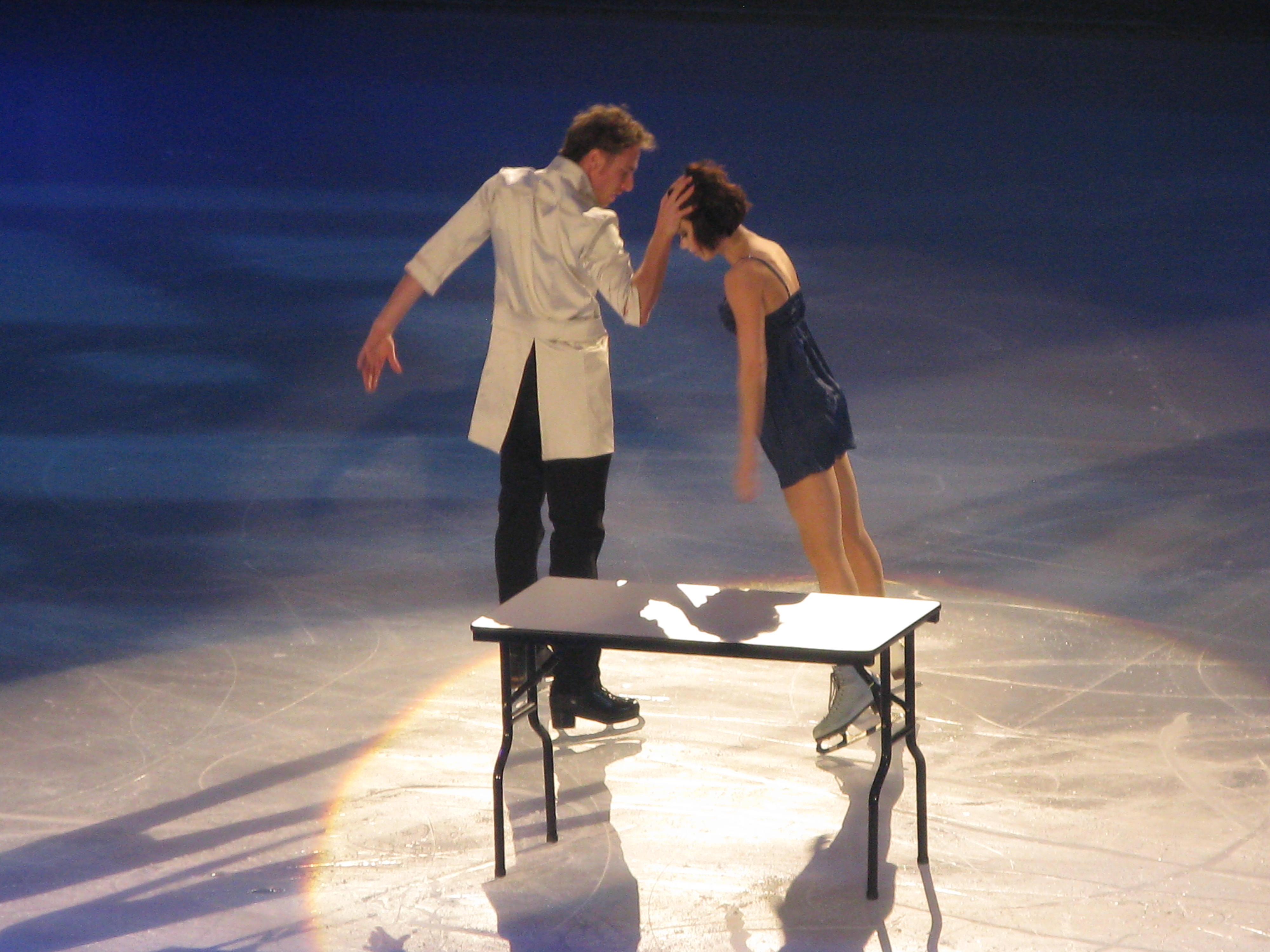 Nathalie Péchalat et Fabian Bourzat lors du gala du trophée Éric Bompard 2013 à Paris-Bercy.